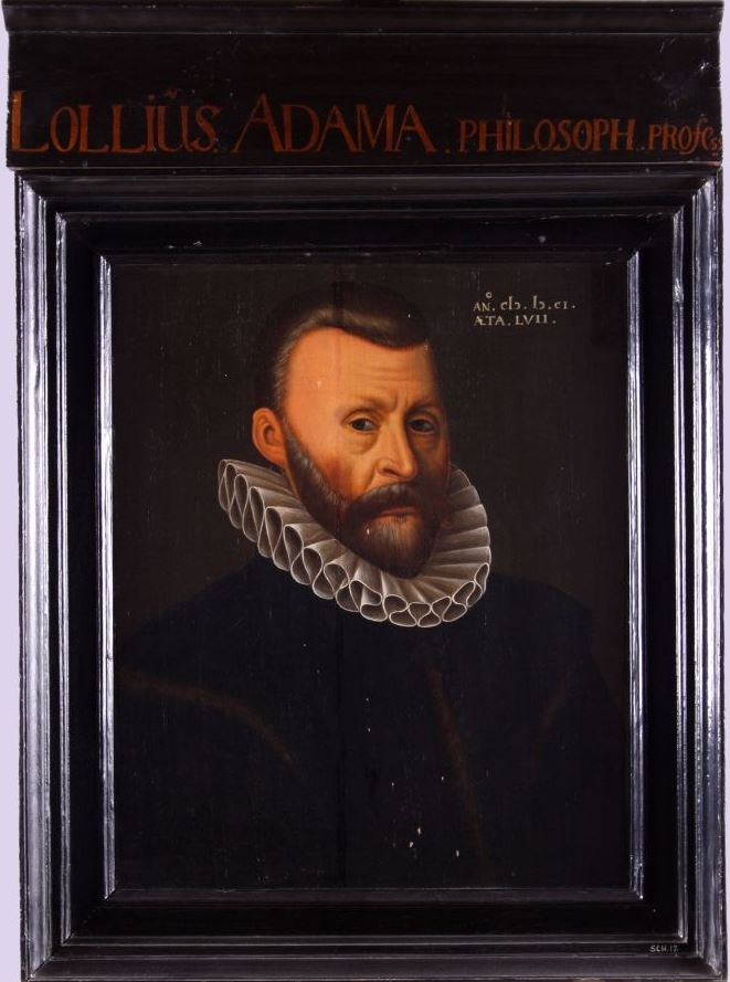 Portret in olieverf van Lollius (Lolke) Adama, professor in de filosofie aan de Franeker universiteit van 1585 tot 1609. Adama is afgebeeld in een donkere, met bruin bont afgezette mantel en een gepijpte plooikraag. HIj heeft bruine haren en een snor. Lollius Adama (Sneek 1544 - Franeker 1609) studeerde in Groningen mogelijk aan de Maartensschool en werd rector van de Latijnse school in Dordrecht. In het stichtingsjaar 1585 werd hij benoemd tot hoogleraar wijsbegeerte aan de Franeker univesiteit en hij bleef daar tot zijn dood. (tekst van Museum Martena)